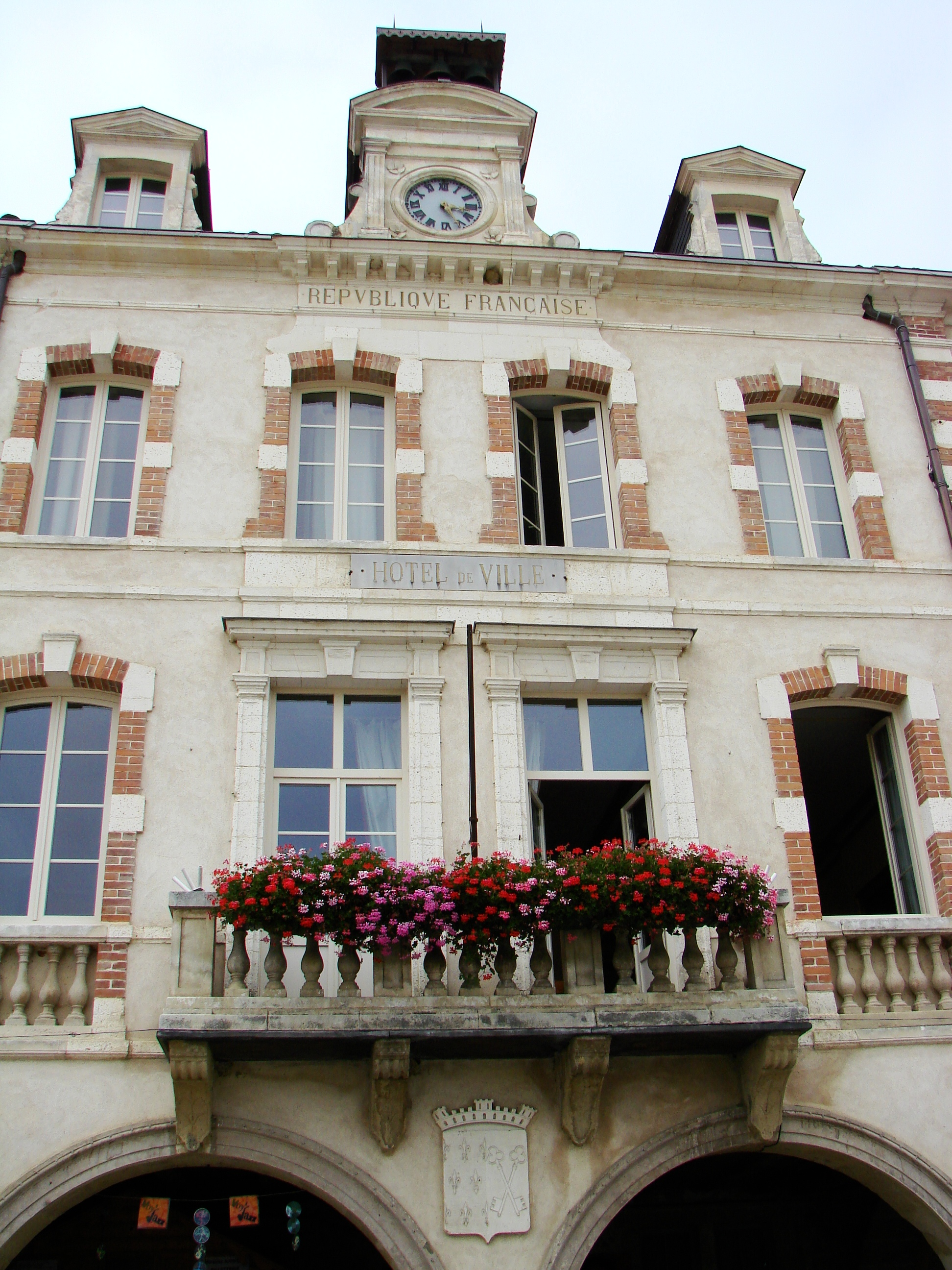 Village de Marciac dans le Gers (France) : façade de la mairie